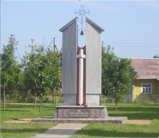 Perloja, Lithuania. (1930)